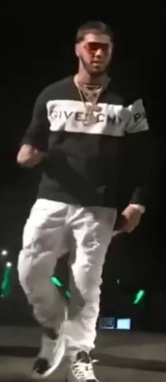 Concierto de Anuel AA con J Balvin